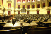 Cámara de Diputados de la Nación Argentina.La Cámara de Diputados de la Nación es una de las dos cámaras que forman el Congreso de la Nación Argentina. Tiene 257 escaños, los cuales deben ajustarse a los resultados de cada censo efectuado cada 10 años, sin que pueda disminuir el número de escaños para cada distrito.